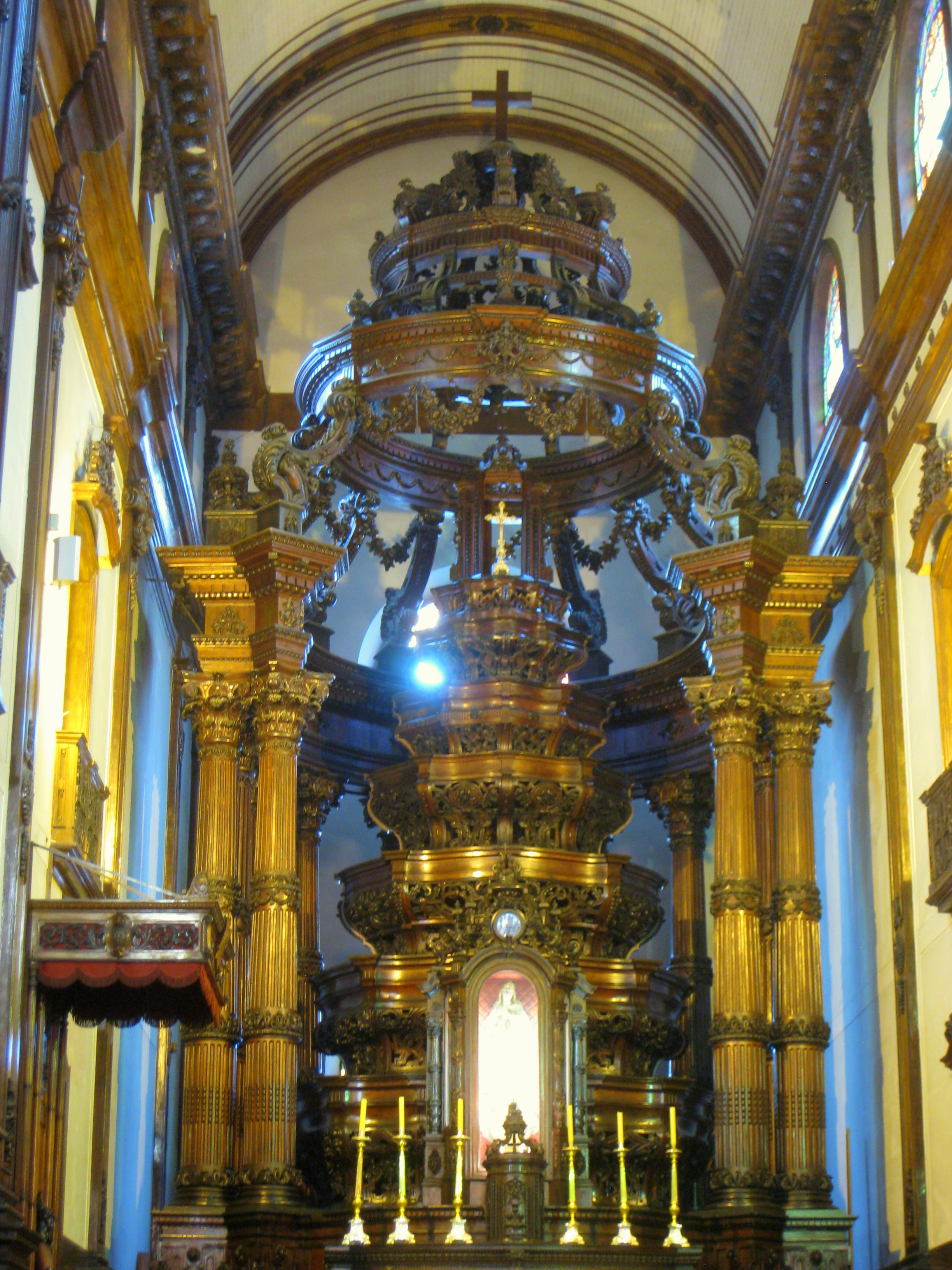 Catedral Metropolitana de Campinas: Nossa Senhora da Conceição, Campinas, SP, Brazil.